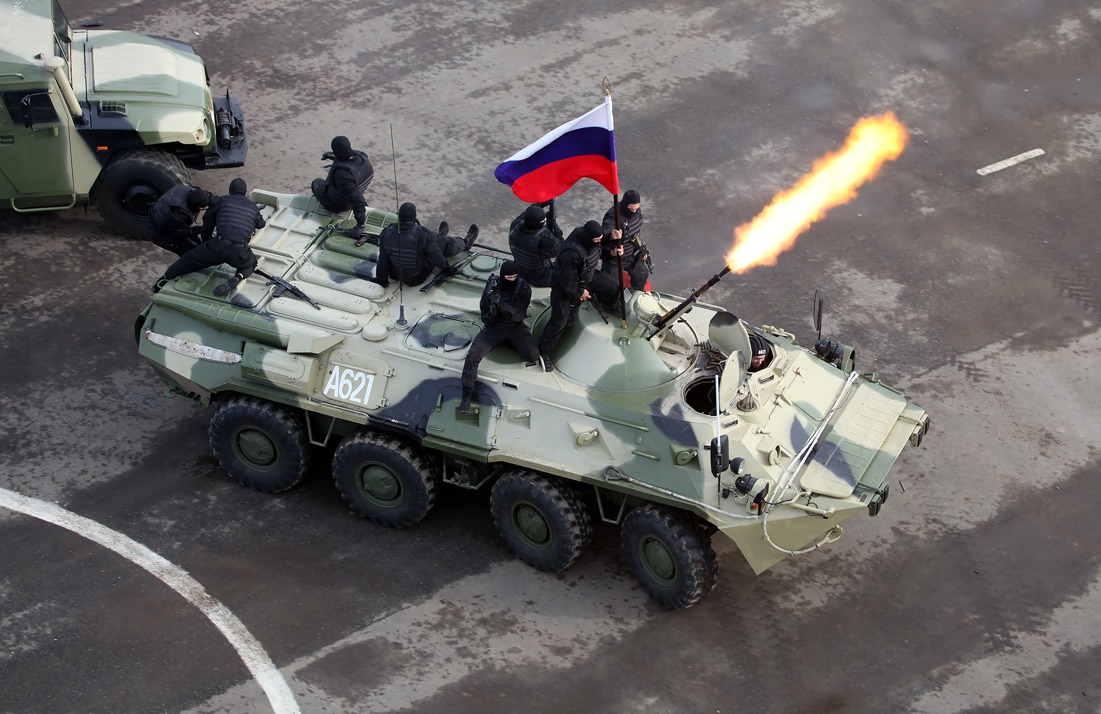 В заключение военнослужащие 604-го ЦСН показали приемы рукопашного боя (As usual in the end operators from 604th Special Purpose Center of Internal troops showed hand-to-hand combat skills and some nice acrobatics)